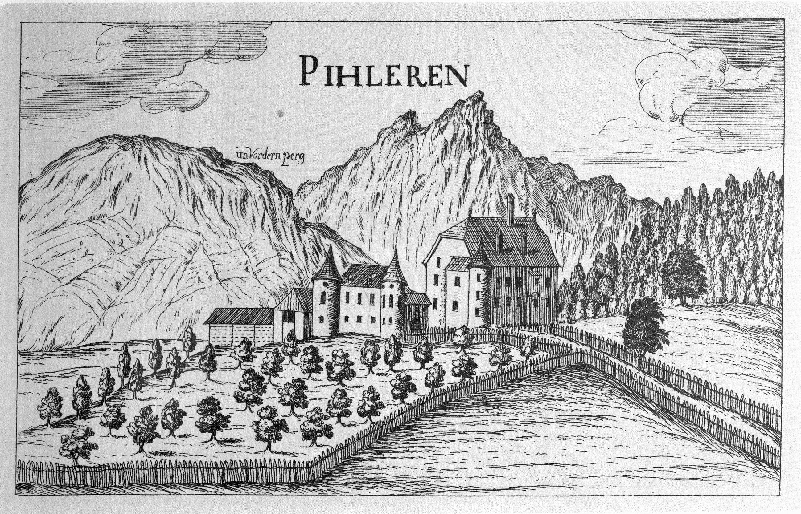 G. M. Vischers Käyserlichen Geographi, Topographia Ducatus Stiriae, Das ist: Eigentliche Delineation / und Abbildung aller Städte / Schlösser / Marcktfleck / Lustgärten / Probsteyen / Stiffter / Clöster und Kirchen / so es sich im Herzogthumb Steyrmarck befinden; Und anjetzo Umb einen billichen Preyß zu finden seynd Bey Johann Bitsch Universitäts Buchhandlern / Auff dem Juden=Platz bey der guldenen Saulen. Graz 1681 Die Nummerierung der Dateien folgt der alphabetischen Reihung der Ortsnamen und entspricht nicht dem Vischer-Register